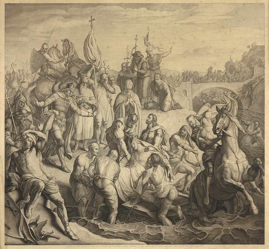 Friedrich Barbarossa's Tod. Kupferstich. 58,5 x 63 cm. Erfunden von Julius Schnorr, im Saal=Bau zu München als enkaustisches Gemälde ausgeführt und unter Leitung des Prof. Thaeter nach dem Carton von Herrmann Walde gestochen.